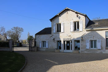 Mairie de La Forêt le Roi